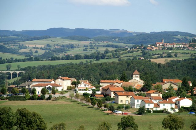 Neaux